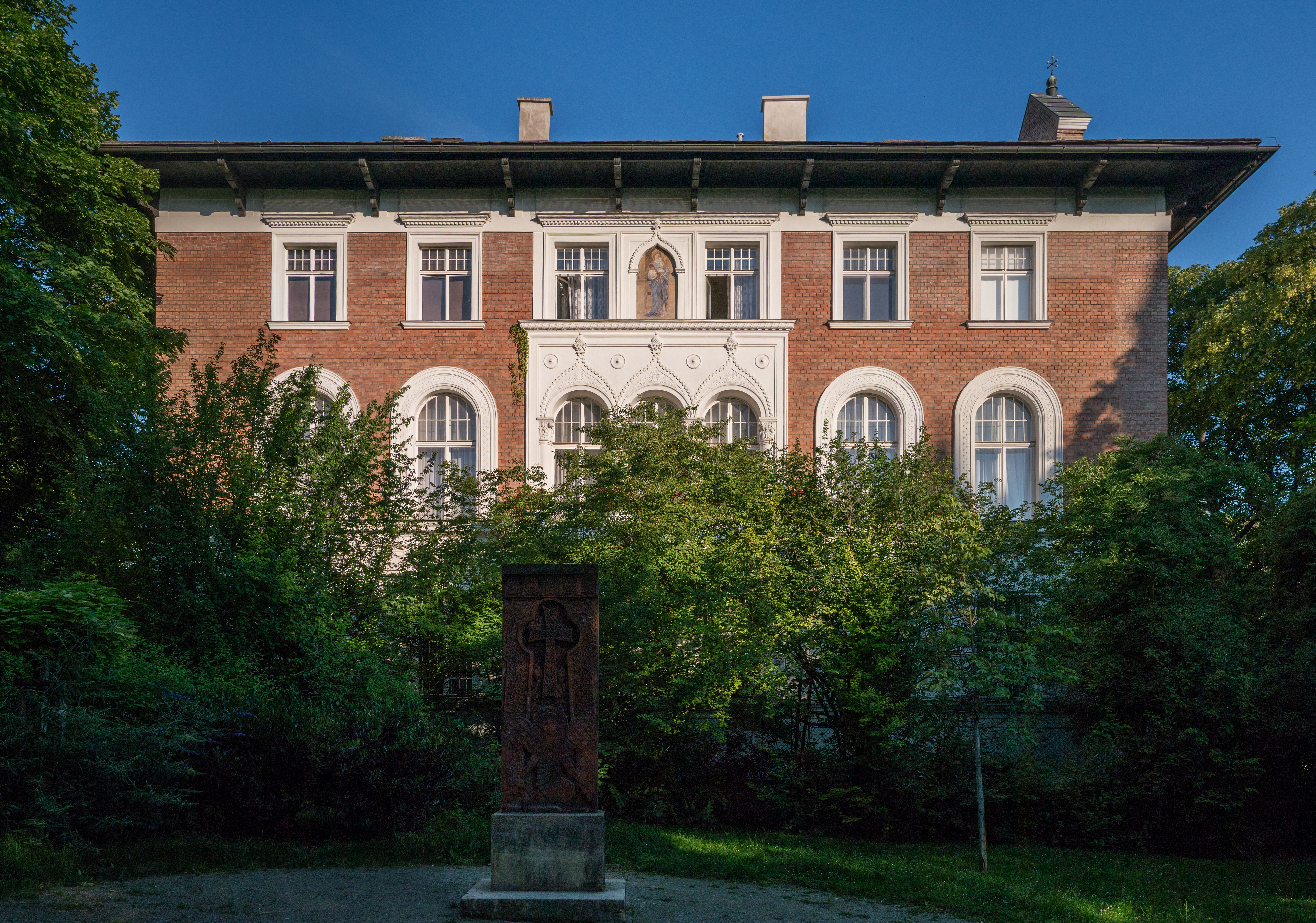 Pfarrhof der Antonskirche; Im Vordergrund ein Stein mit Aufschrift Caritas Arge Armenien Hilfe, 1990